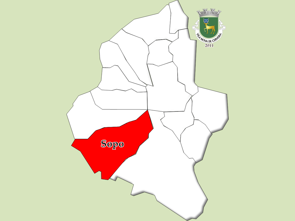 Censos 1864/2011